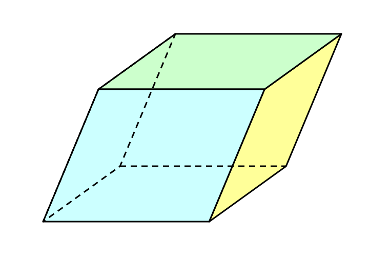 Parallellopipedum - eigen werk - PD